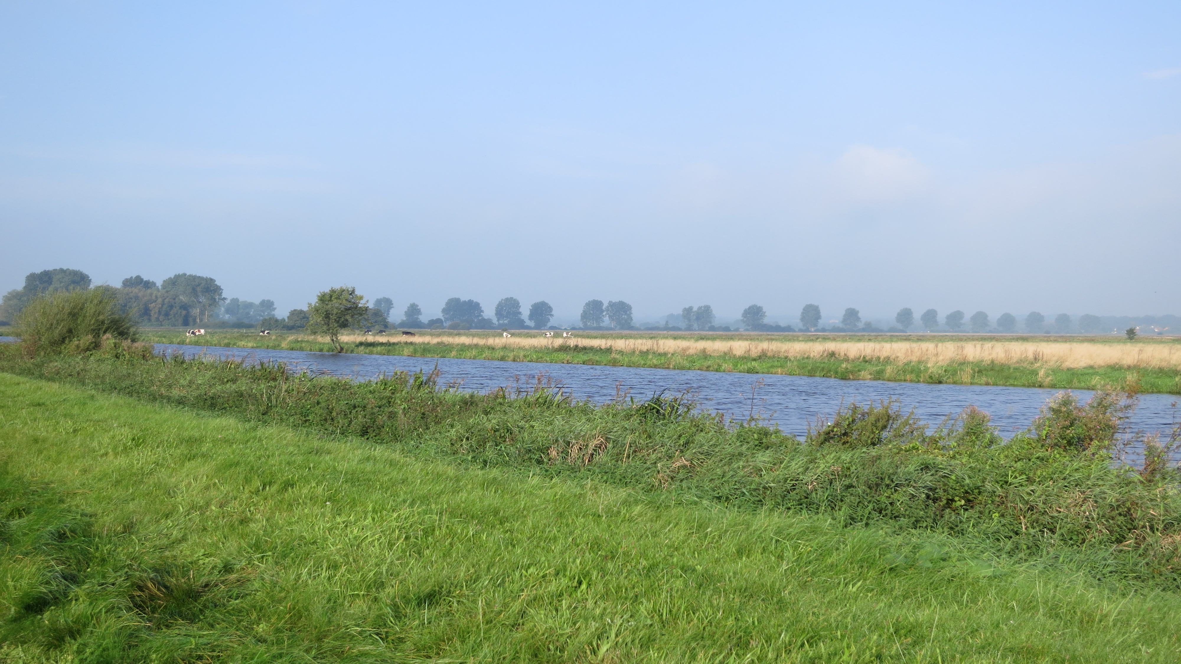 Die Hamme von der Worpsweder Flussseite aus gesehen